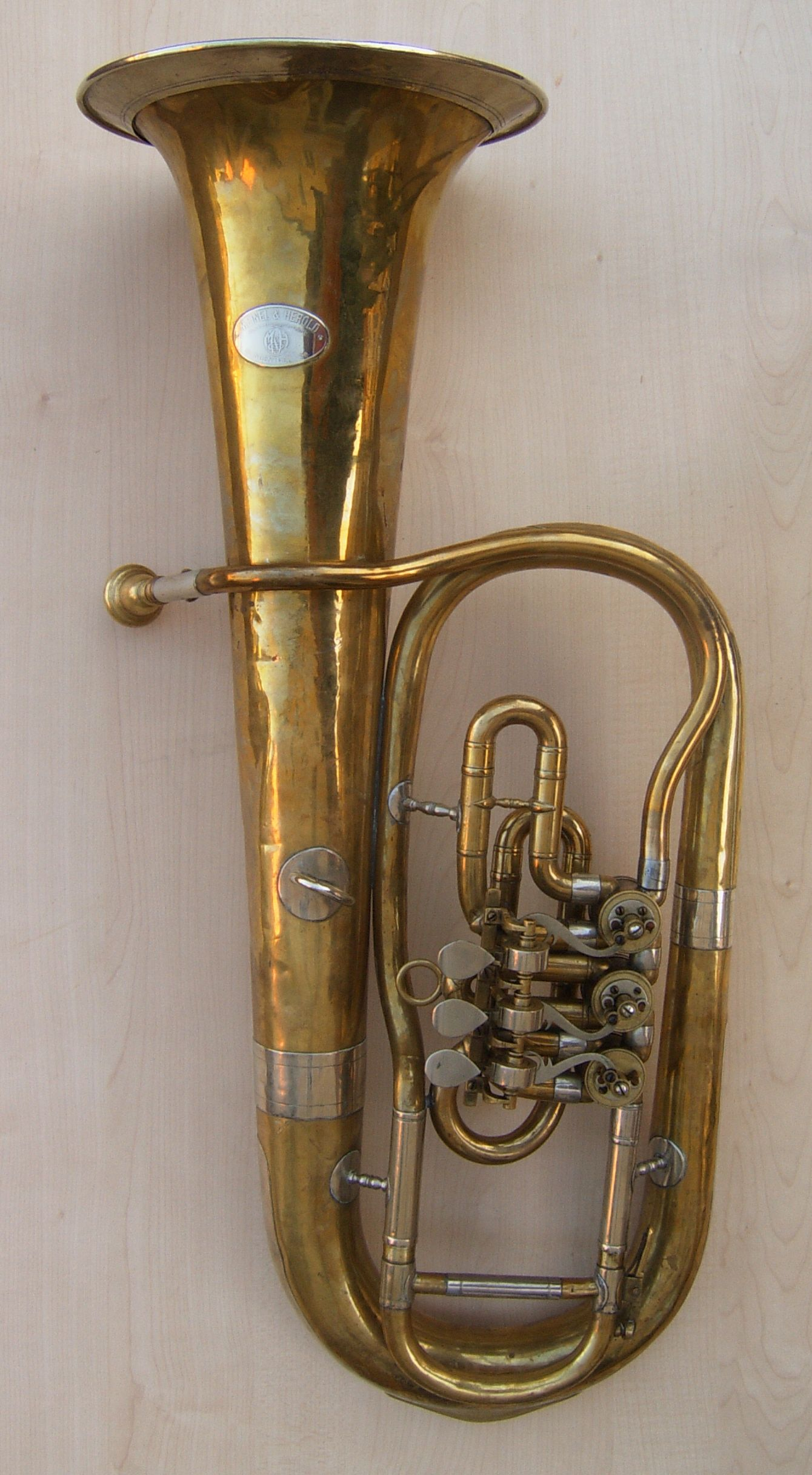 Deutsches Baritonhorn in B-Stimmung